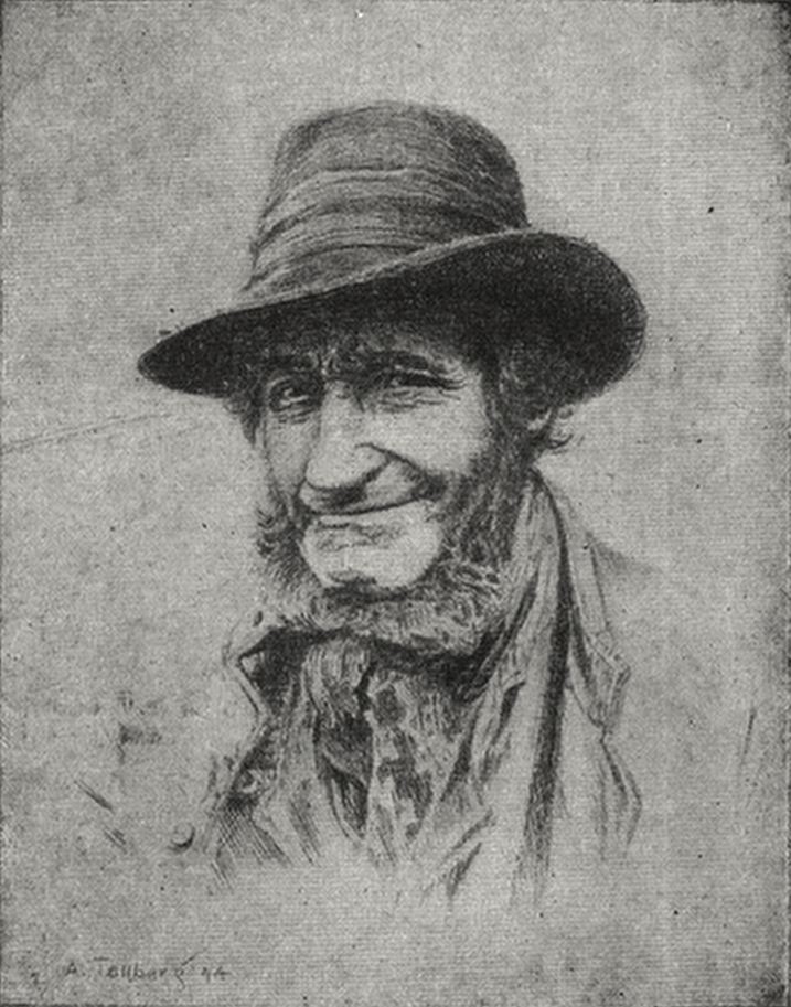 Fig. 2. Studielmfvud. Etsning af A. Tallberg. (Positiv etsningsmetod.)